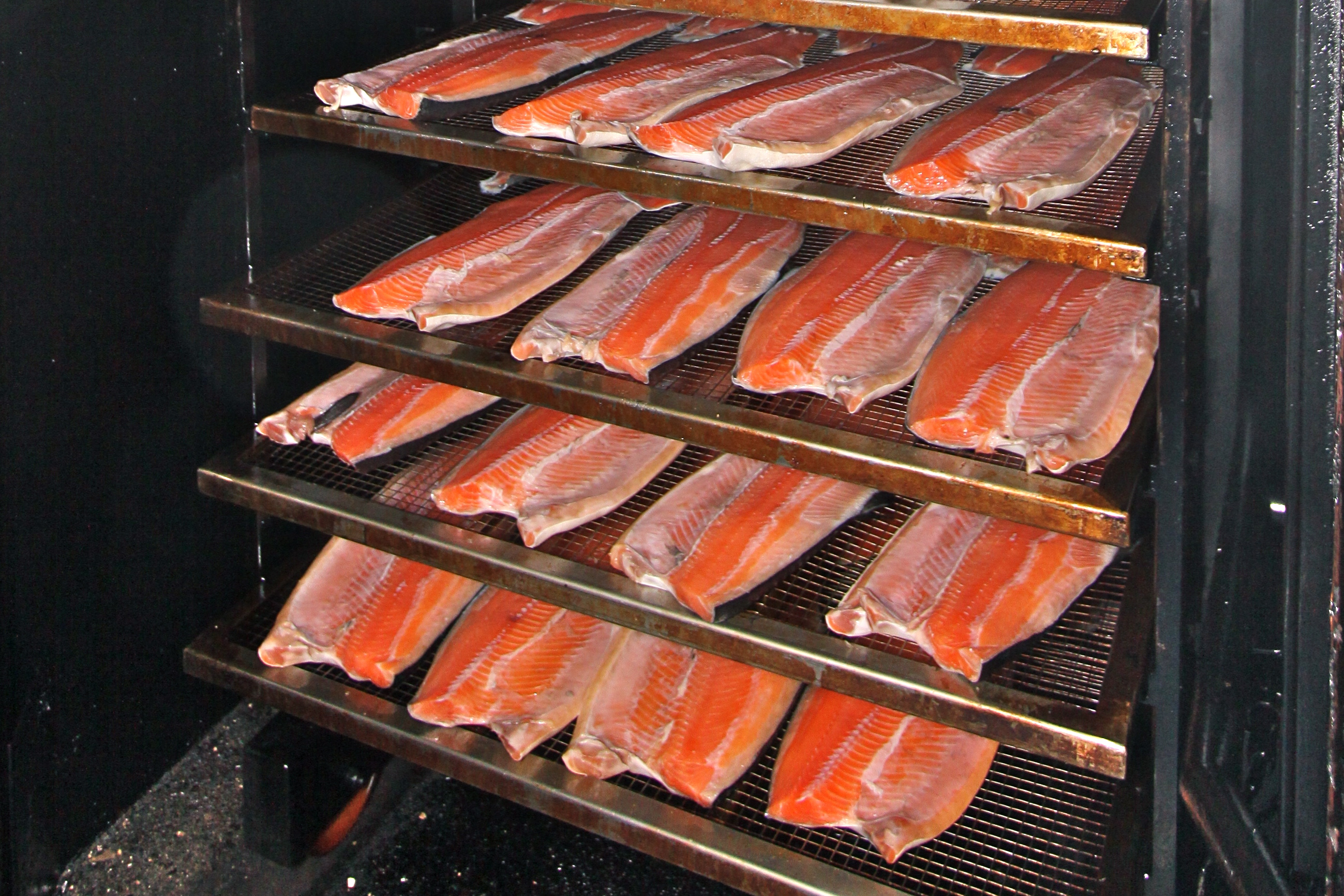 Balik Lachsräucherei, Lachshälften in der Räucherkammer. Sie dürfen das Foto mit Nennung des Autors honorarfrei vervielfältigen, verbreiten und öffentlich zugänglich machen. Foto: Jürg Vollmer /